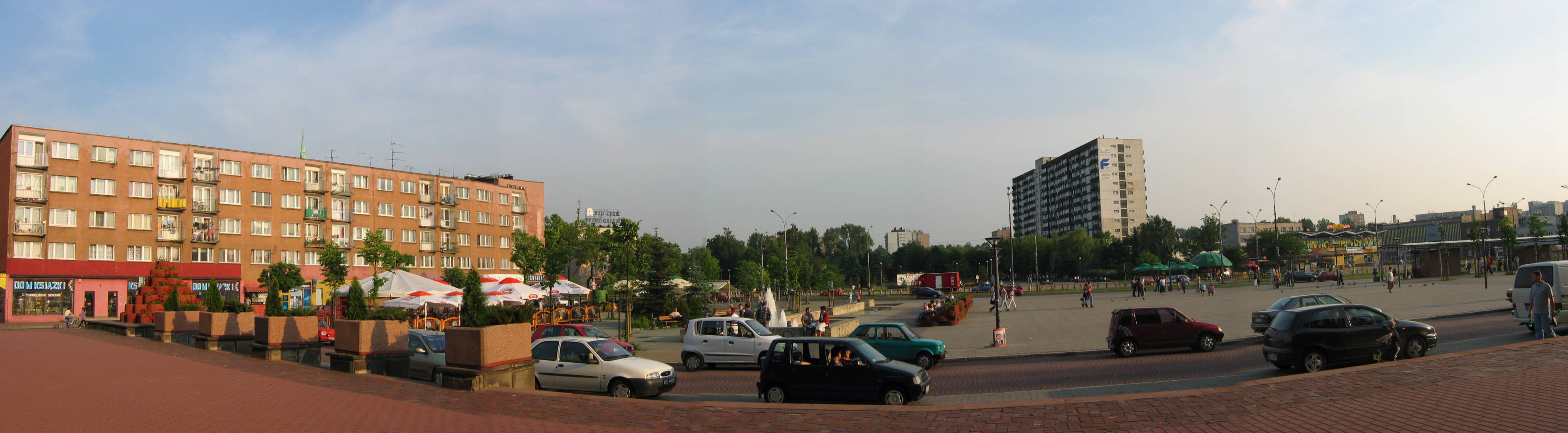 Dąbrowa Górnicza